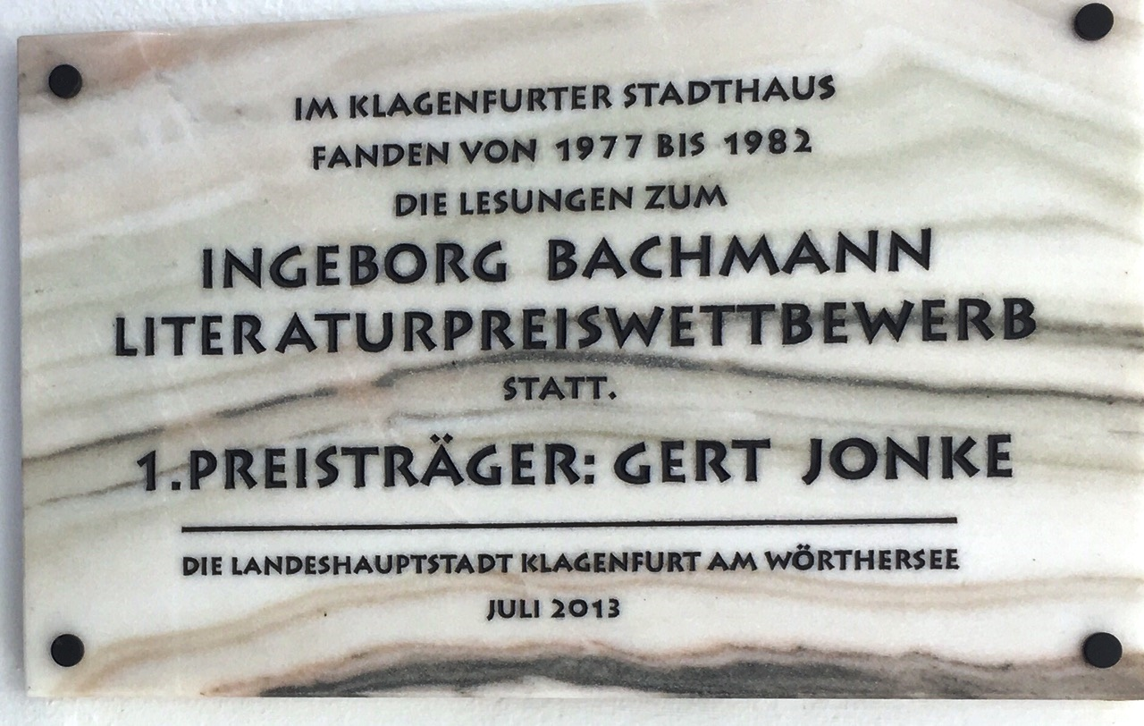 Bürgerhaus, ehem. Kleinmayrhaus